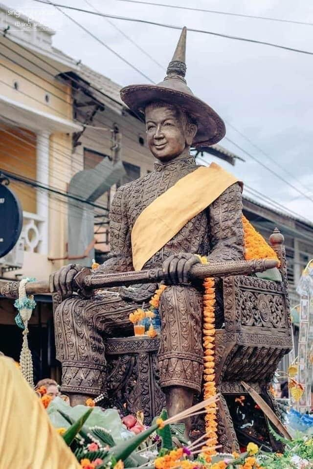 King Sayasethathirath